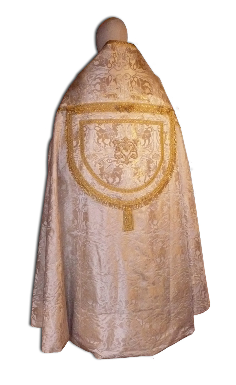 Piviale di foggia tradizionale romana, in lampasso broccato d'oro e d'argento con applicazioni in perle, galloni d'oro, frange in canuttiglia operata e vermiglioni.